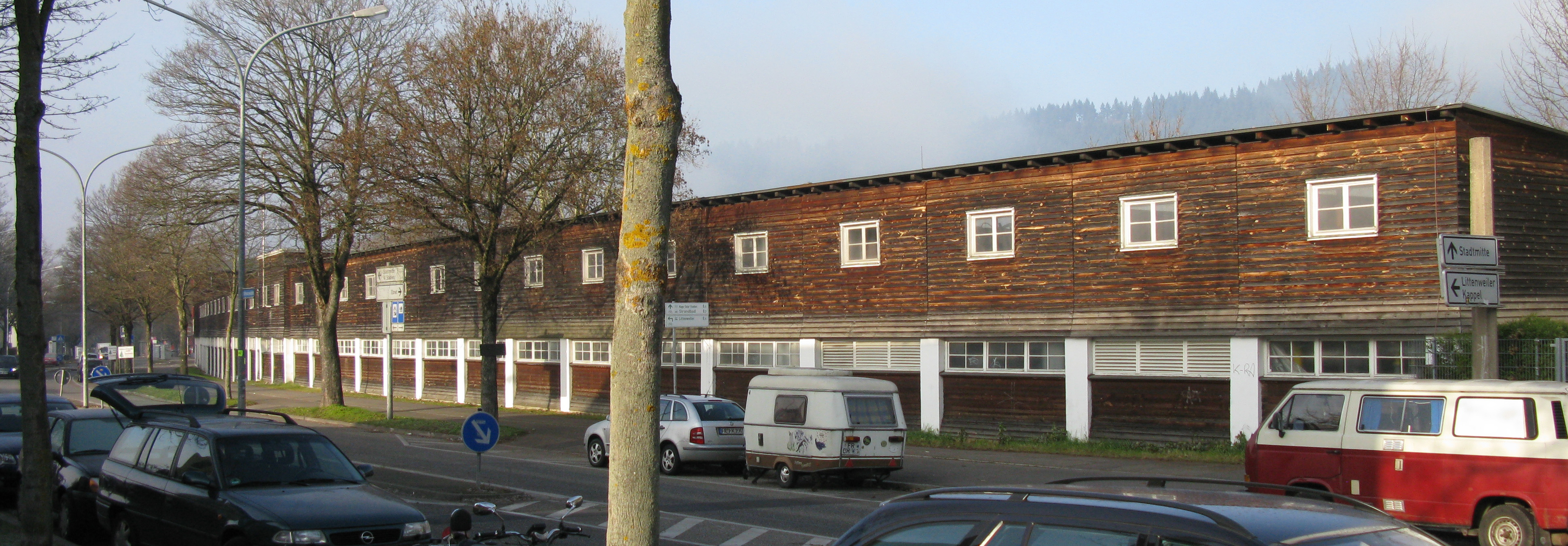 Strandbad Freiburg, erbaut 1934